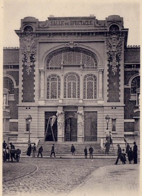 Theatre Sebastopol en 1903